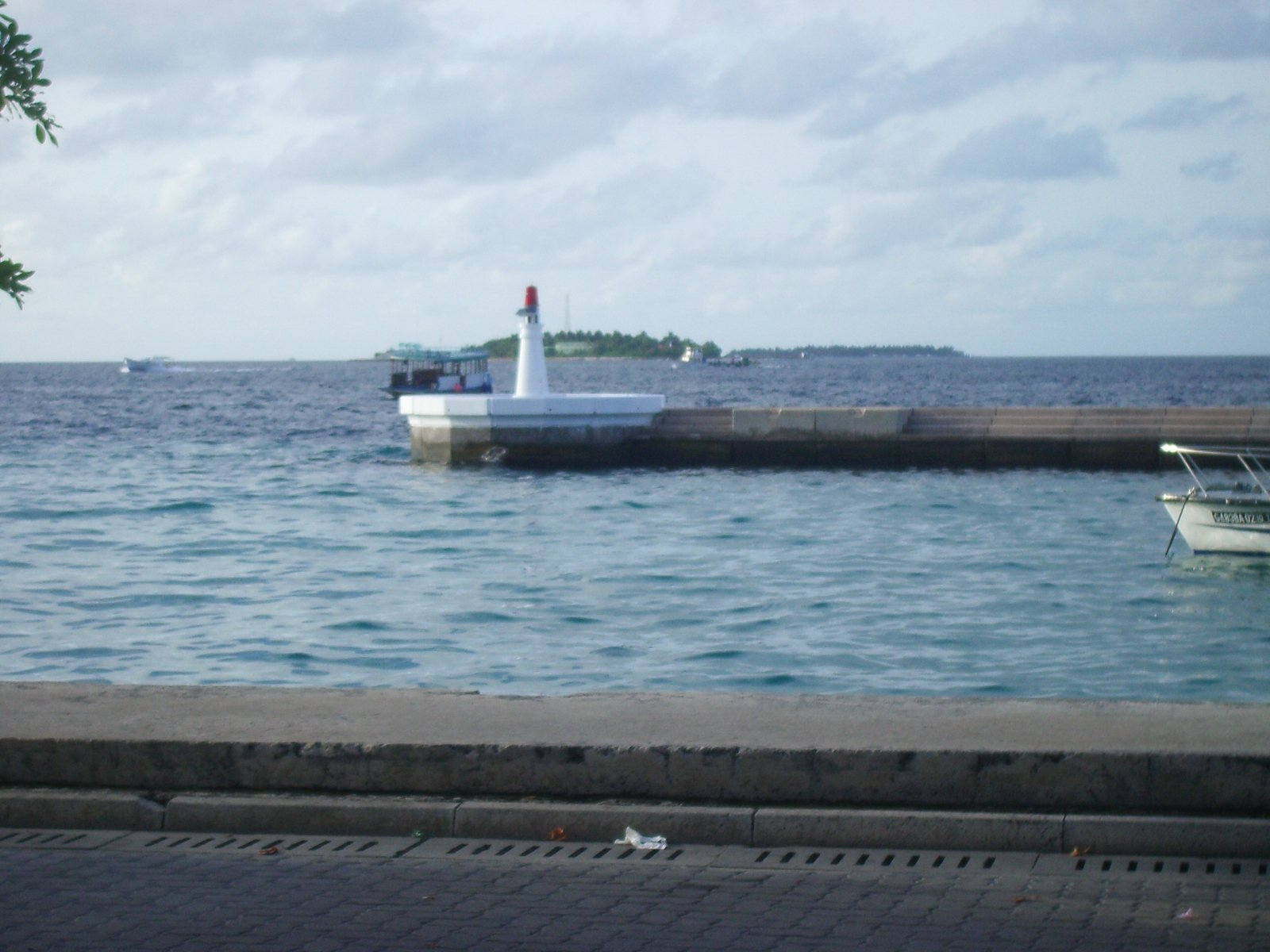 Far al port de Male; foto feta per J. Ollé el juliol del 2006.